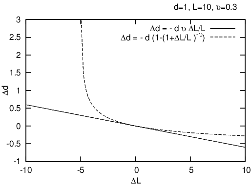 Du formuloj por efiko de Poisson